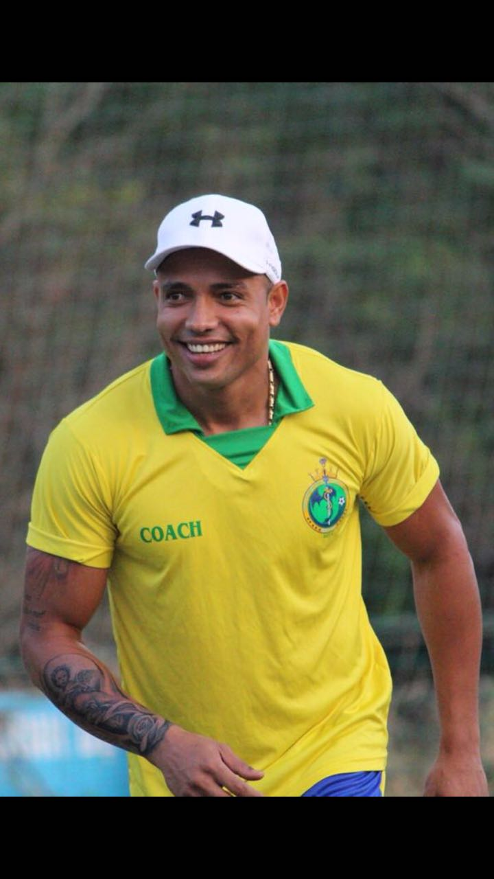 Ricardinho atuando na sua escola de futebol situada na cidade de Ho Chi Minh, vietnam.